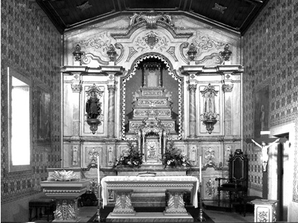 Vista do interior da igreja paroquial de Este S. Mamede, em Braga, Portugal.